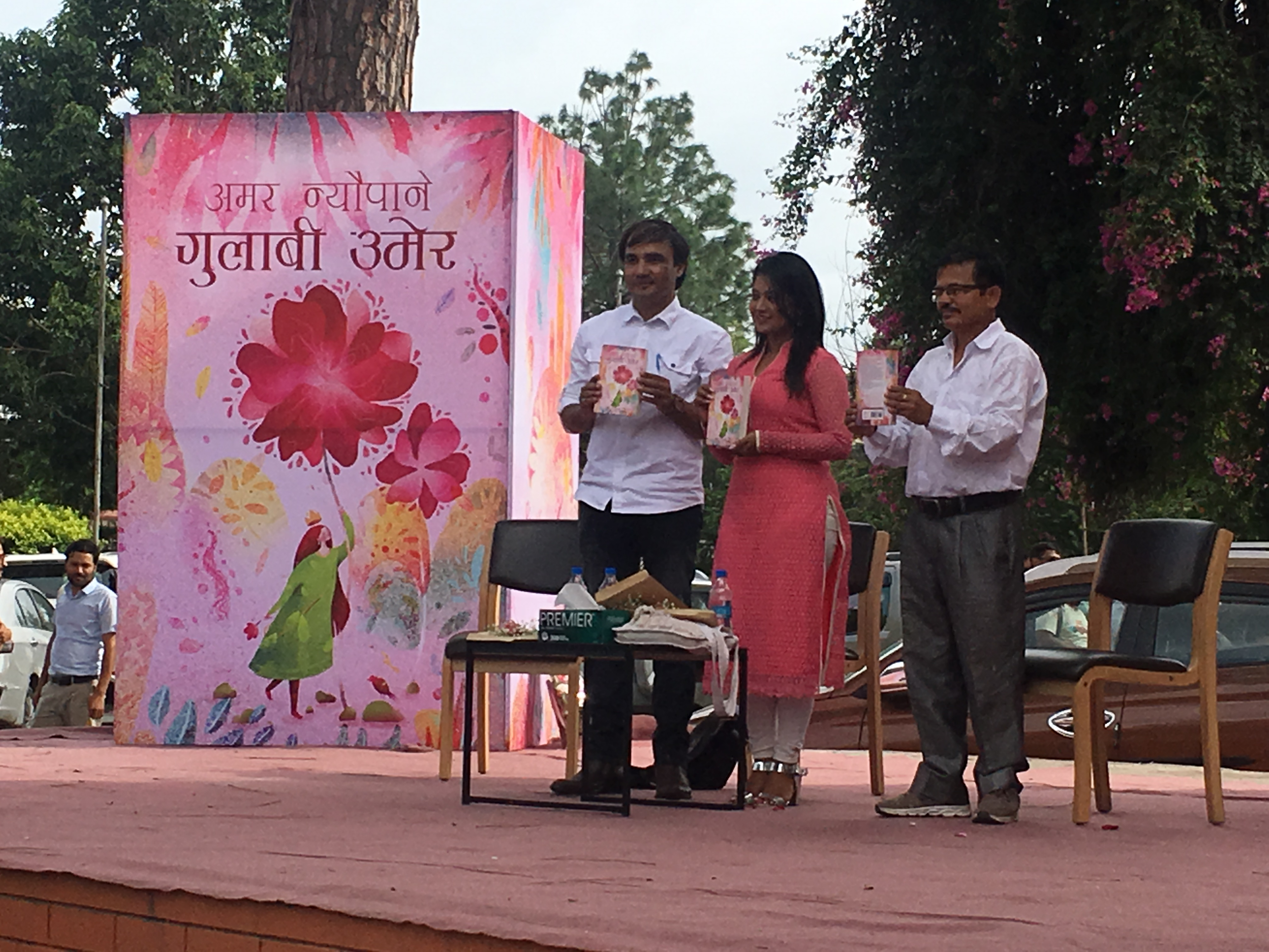 नेपाली: गुलाबी उमेरको विमोचनमा अमर न्यौपाने